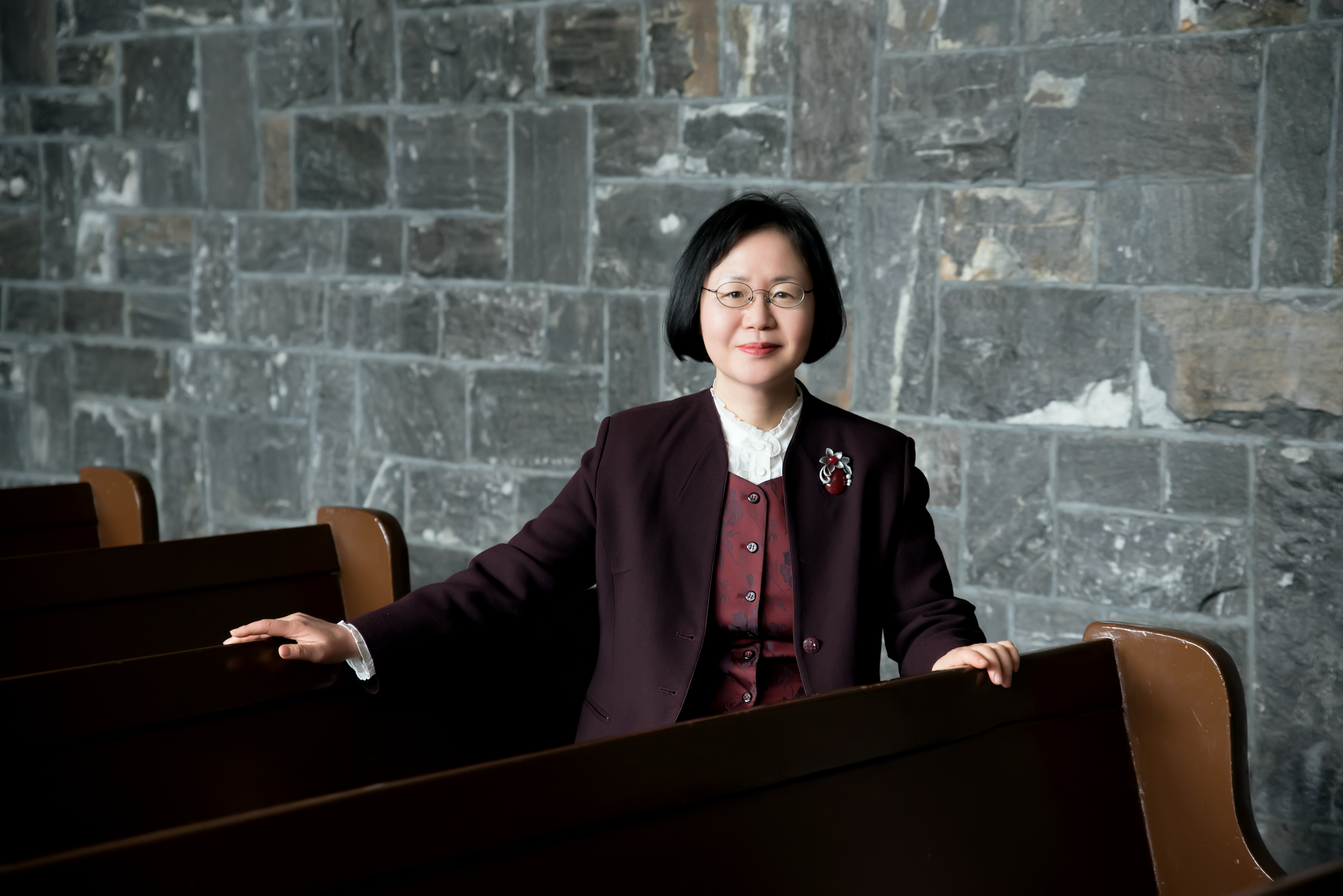 연세대학교 정미현 교수